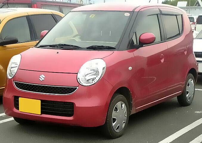 スズキ・MRワゴン（2代目）